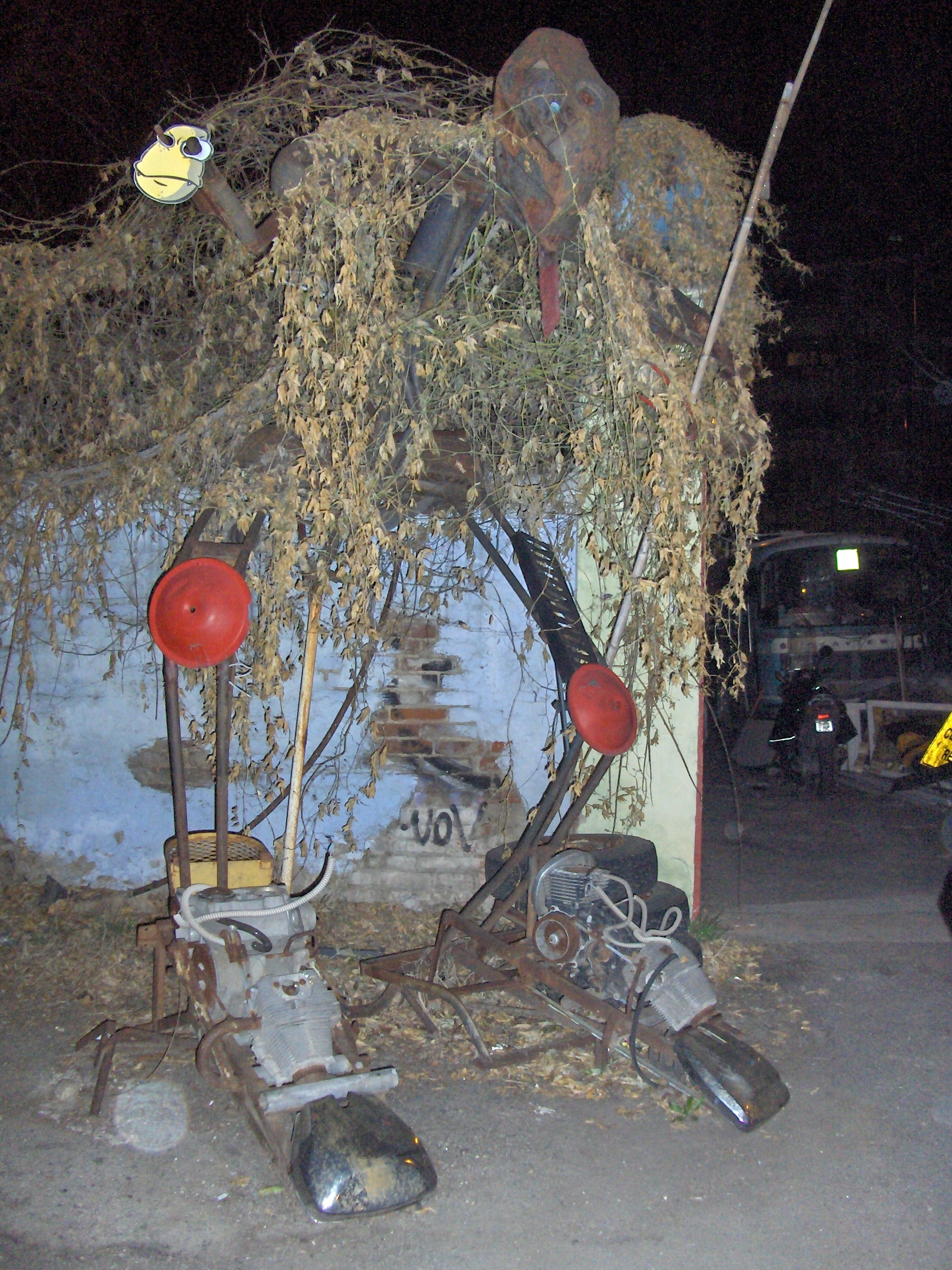 Torino - The Guardian di fronte alla casa occupata "El Paso Occupato"